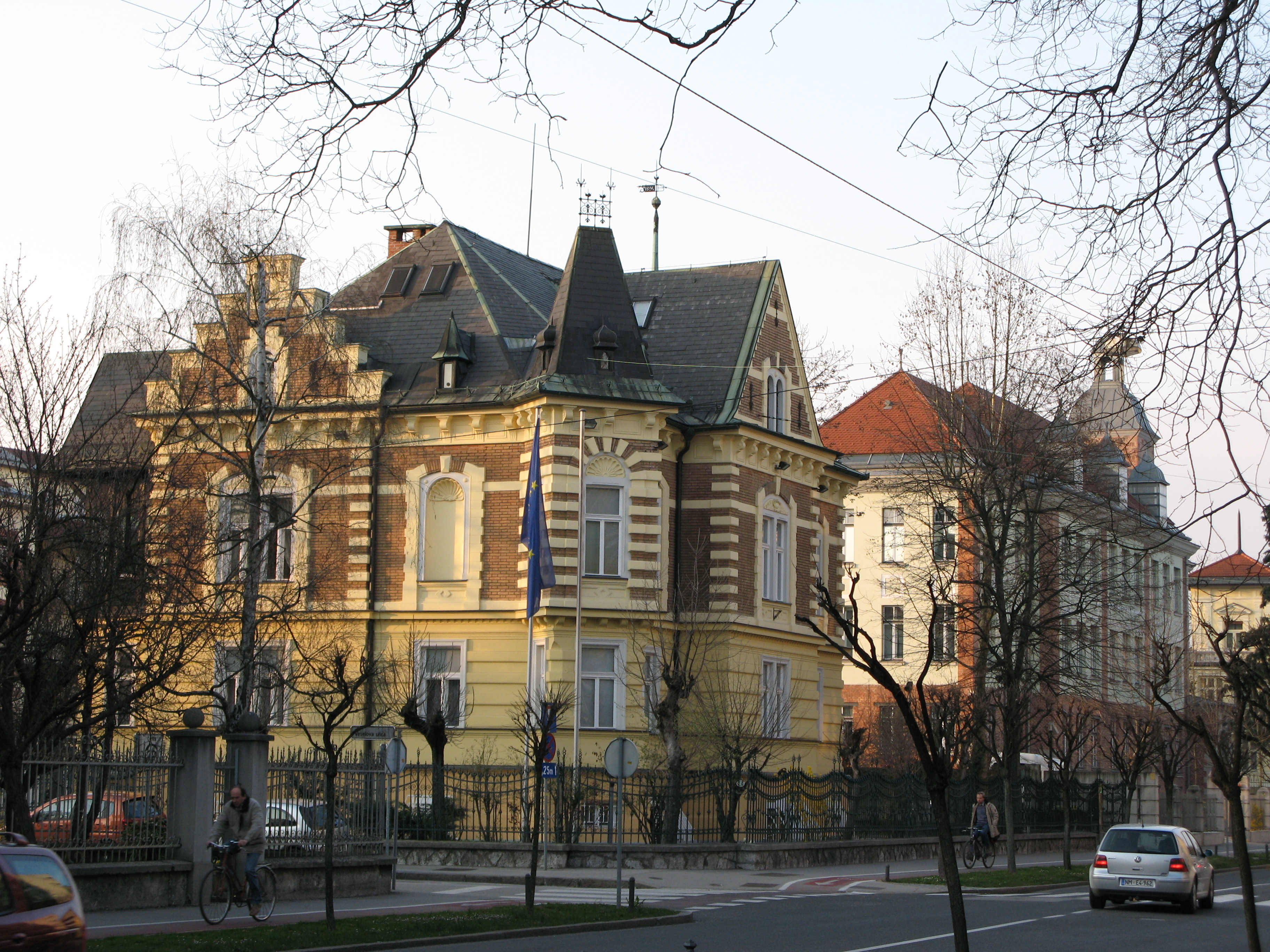 Ljubljana